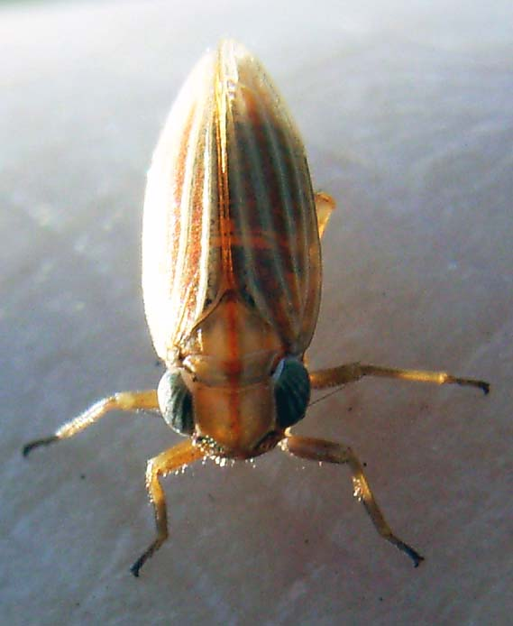 Weibchen einer Moorkäferzikade (Ommatidiotus dissimilis), kurzflügelige Form